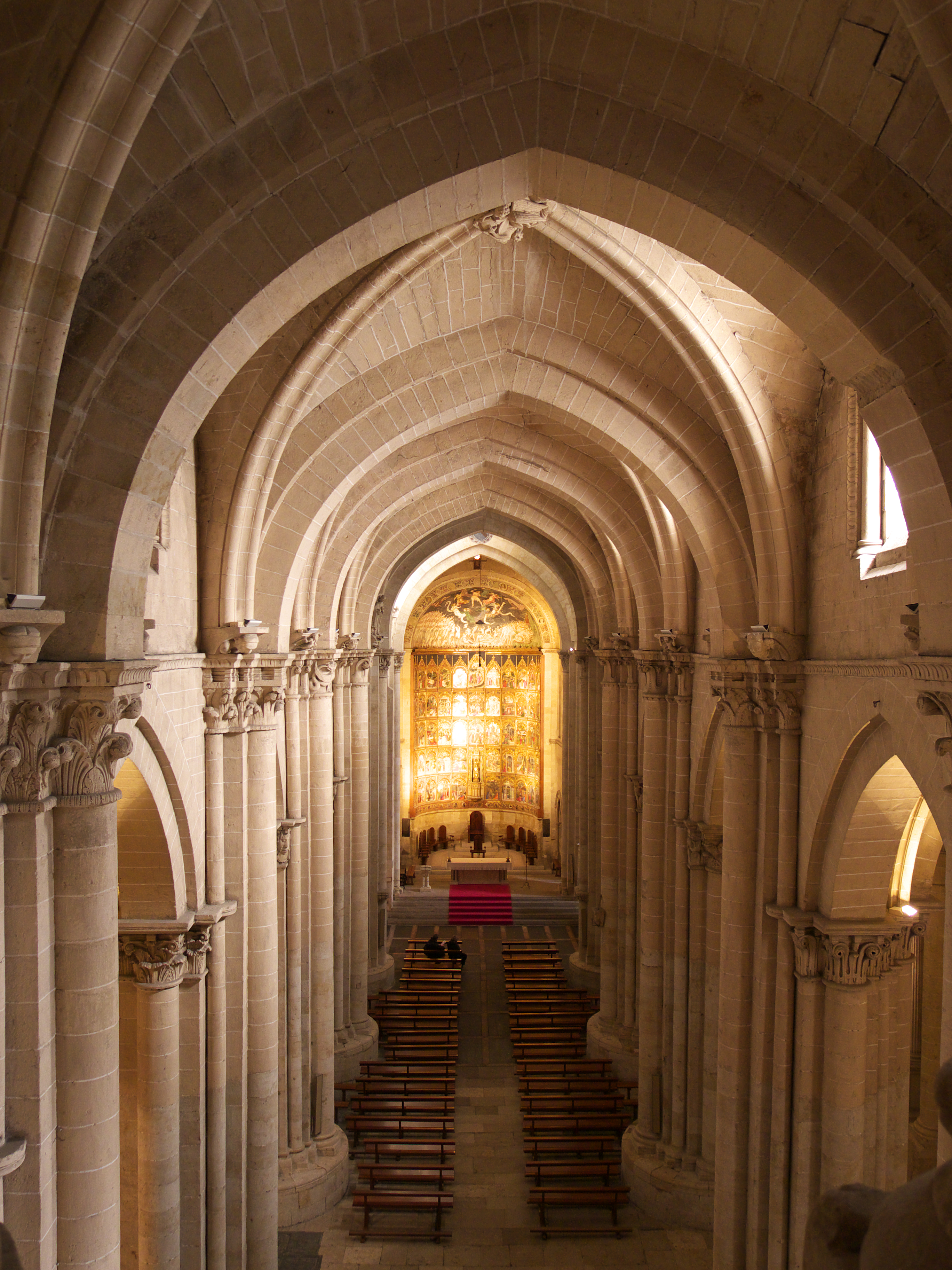 Espectacular muestra del arte protogótico español con influencia afrancesada.